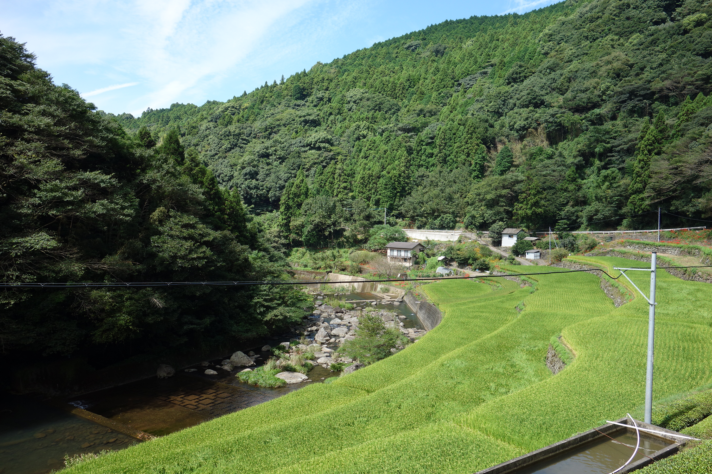 東彼杵町八反田郷